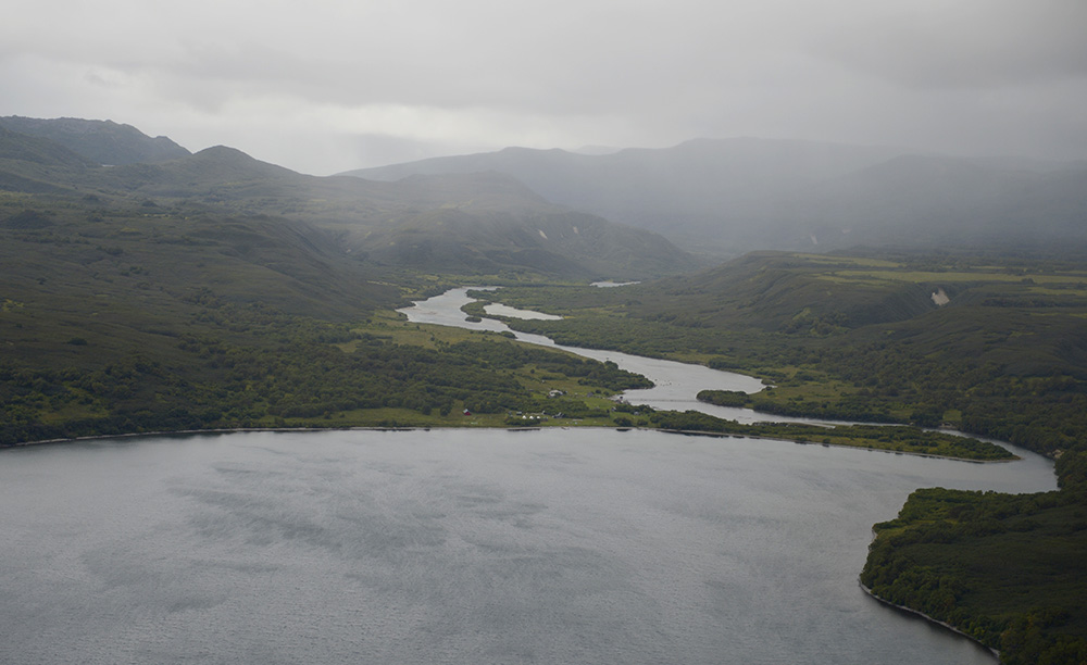 Курильское озеро и исток Озёрной реки. До устья реки в Охотском море реке течь 62 км. Домики у истока — кордон Южно-Камчатского заказника. Там же находится рыбоучётная станция КамчатНИРО — Камчатского научно-исследовательского института рыбного хозяйства и океанографии.